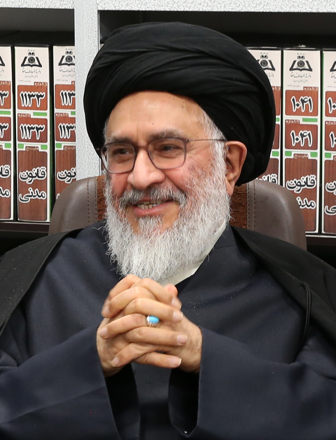 سید مصطفی محقق داماد در مرکز پژوهشی دانشنامه های حقوقی علامه